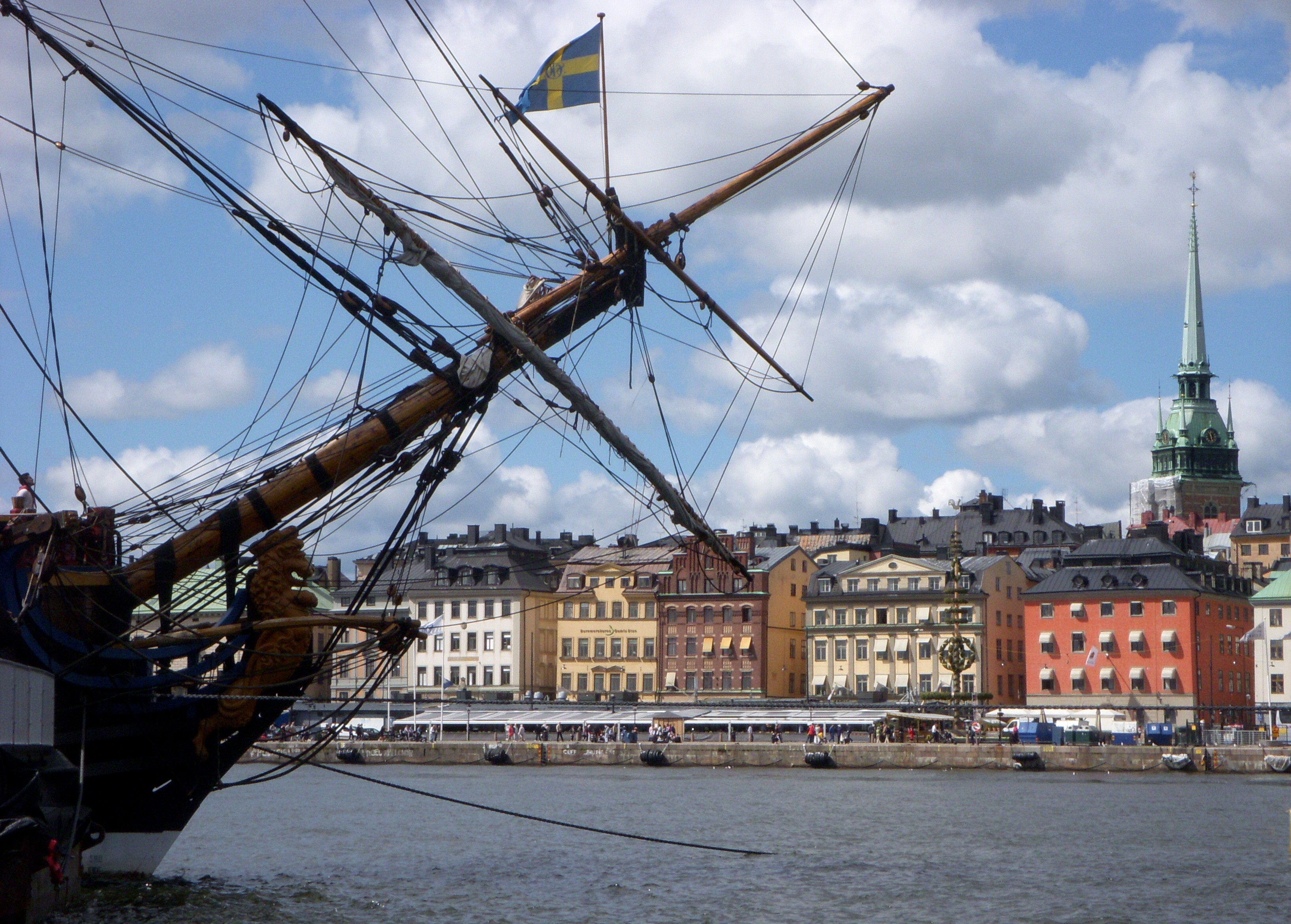 Ostindienfararen Götheborg i Stockholm i juni 2010 i samband med Bröllopet mellan kronprinsessan Victoria av Sverige och Daniel Westling